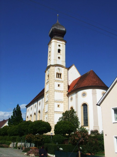 Kath. Pfarrkirche St. Stephan, Pfaffenhausen, Landkreis Unterallgäu